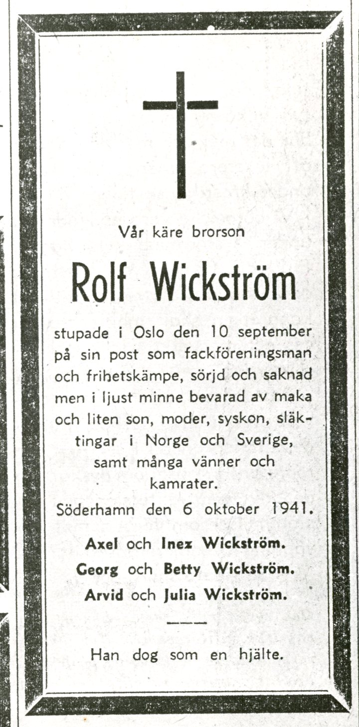 Rolf Wickstrøms dødsannonse i svensk ”Socialdemokraten” RA/PA-1209/Uc/66/7/L2045